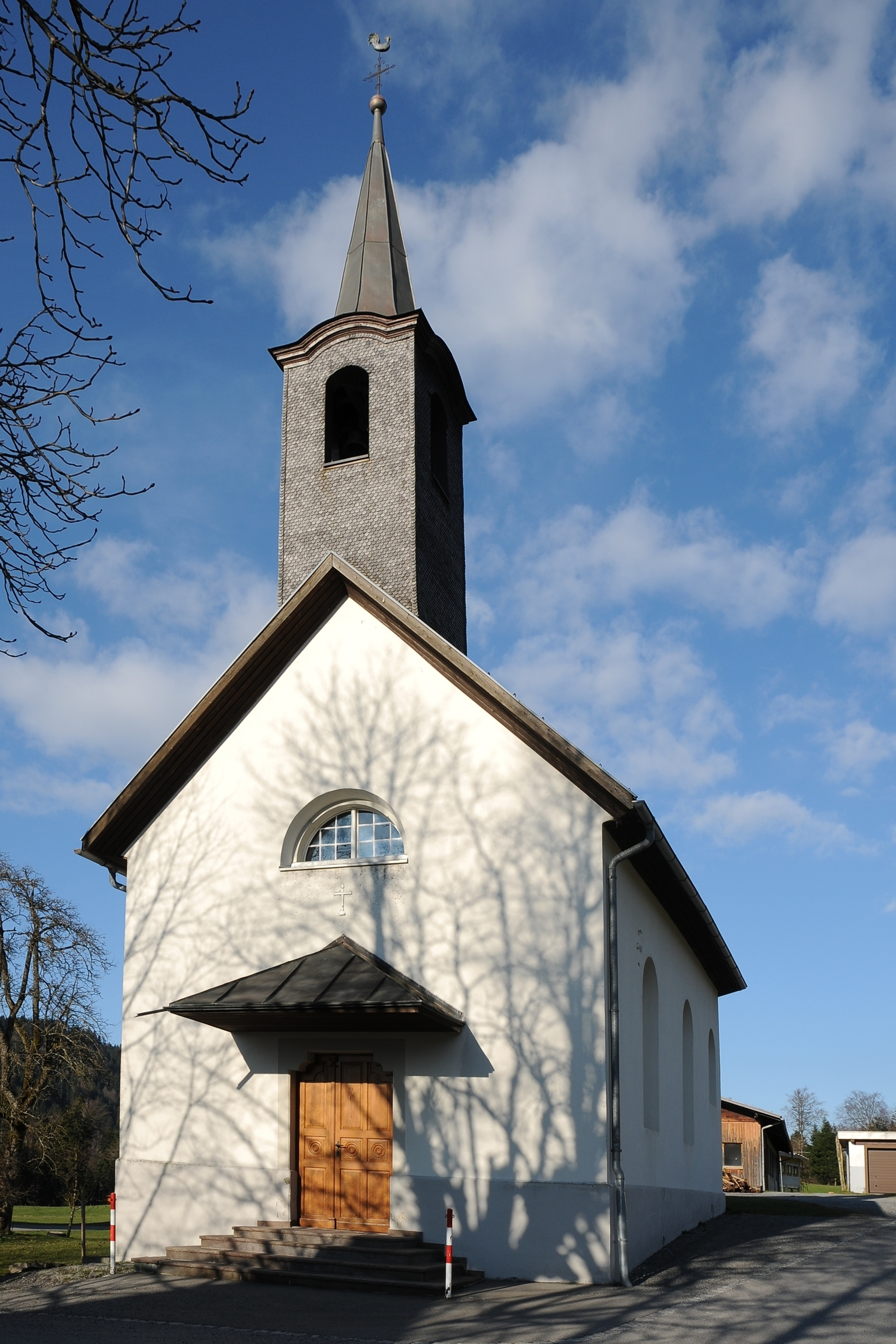 aus dem DEHIO Vorarlberg 1983: KAPELLE, Maria Schnee, im Dornbirner Winsau. Rechteckbau mit 3/8-Chor, Satteldach, Glockentürmchen mit Spitzhelm über der Fassade. Nördlich am Chor Sakristei. Betraum mit Tonnengewölbe, Rundbogenfenster, eingezogener gedrückter Chorbogen, 3/8-Chor mit Tonnengewölbe. Fassade mit Rosettenfenster. Fresko im Betraum Krönung Mariens, Mitte 19. Jh.*** Altäre von Matthäus Thurnher, Handelsmann in Dornbirn, gestiftet. Hochalter klassizistischer Aufbau 1870, Altarbild Mariena mit Kind, bezeichnet I.C. Rick pinx. 187* (?)., Oberbild Gott Vater und Hl. Geist, Figuren links hl. Petrus, rechts hl. Paulus, Mitte 19. Jh. Linker Seitenaltar mit neuromanischem Aufbau, Altarbild hl. Wndelin von Caspar Rick. Rechter Seitenaltar mit neuromanischem Aufbau, Altarbild hl. Martin, von Caspar Rick.